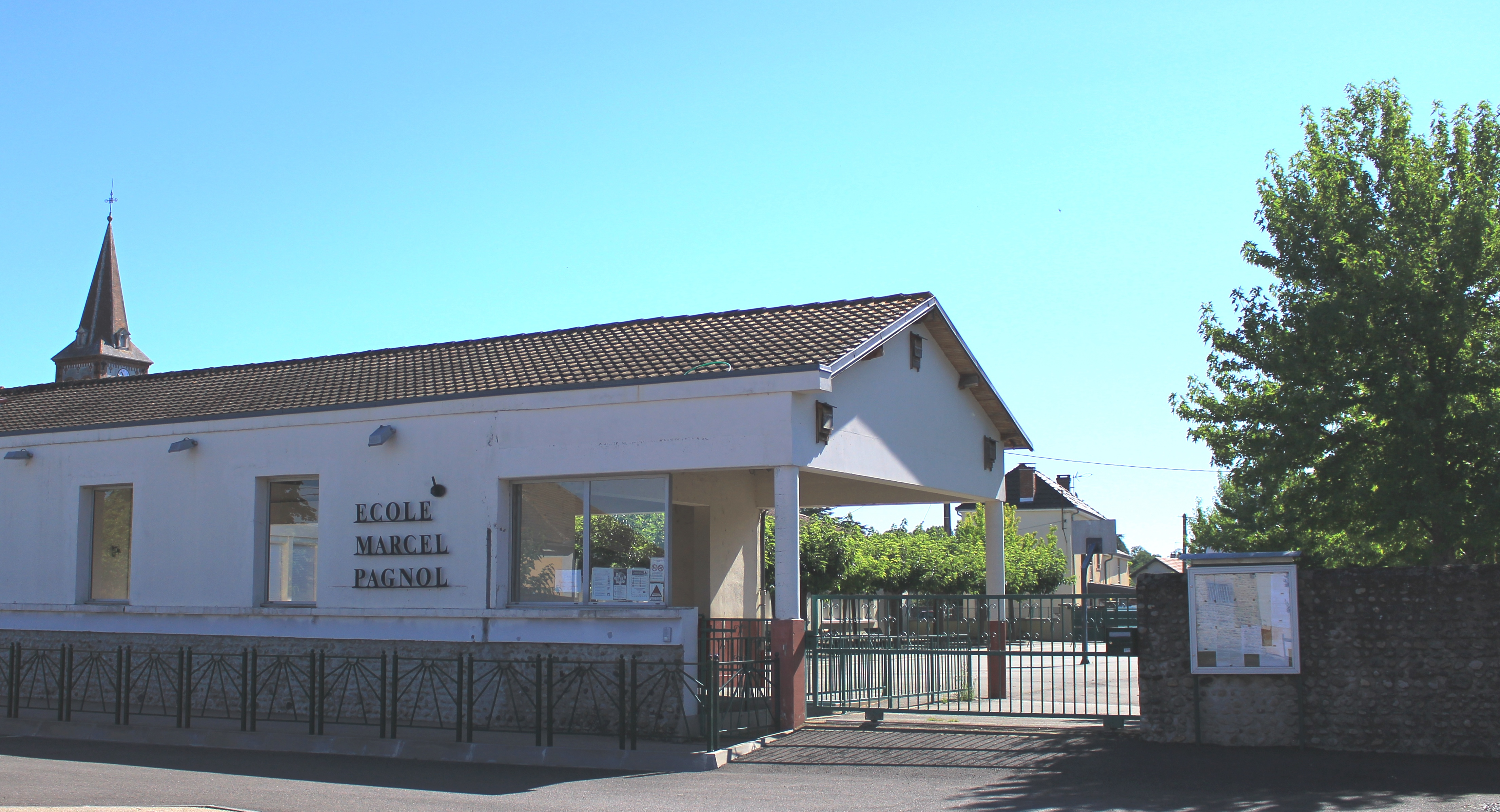 École de Bazet (Hautes-Pyrénées)